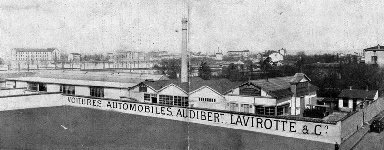 L'usine Audibert et Lavirotte à Lyon en 1896 - site racheté en 1902 par Marius Berliet.